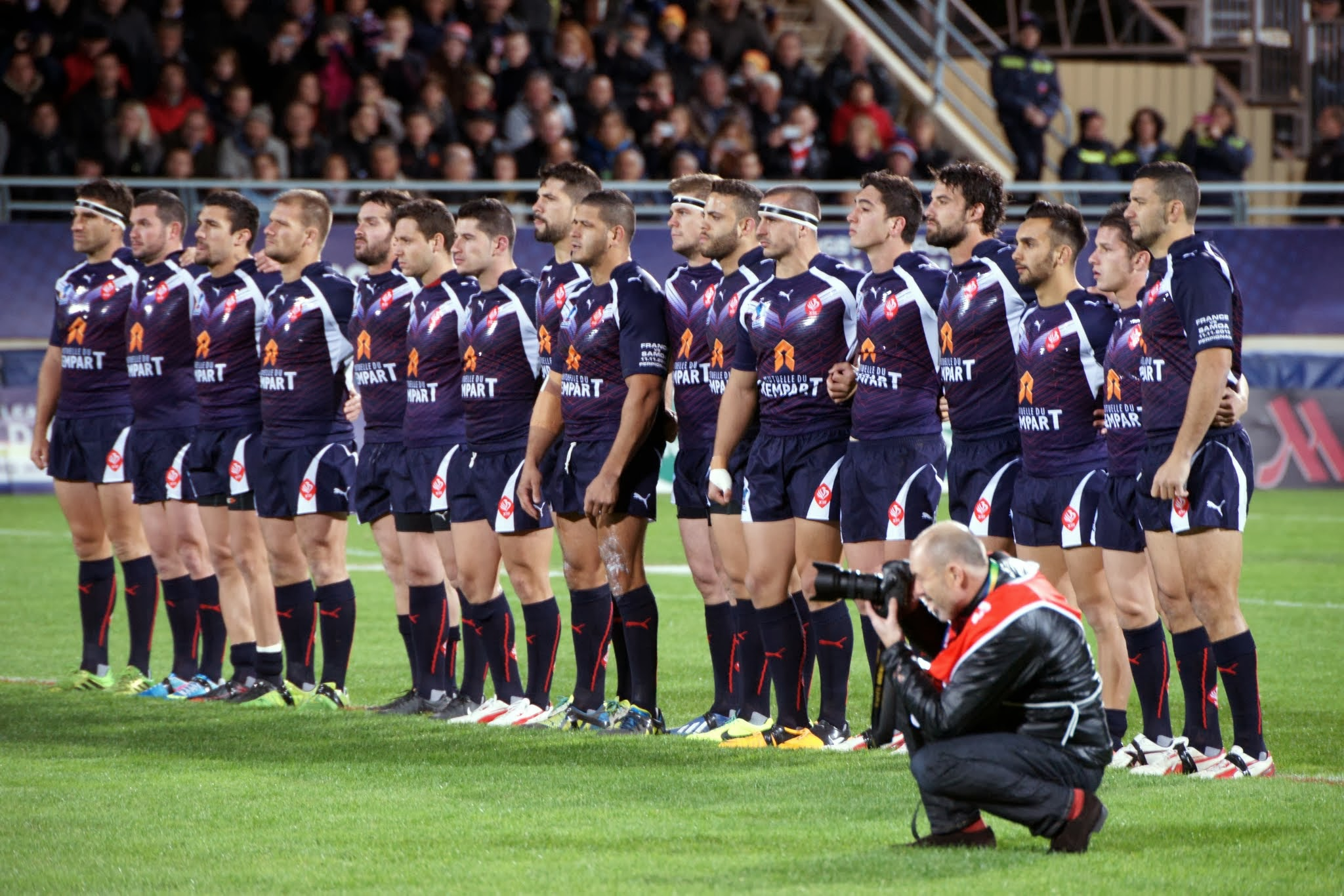 L'équipe de France de rugby à XIII face au Samoa le 11 novembre 2013 à Perpignan.